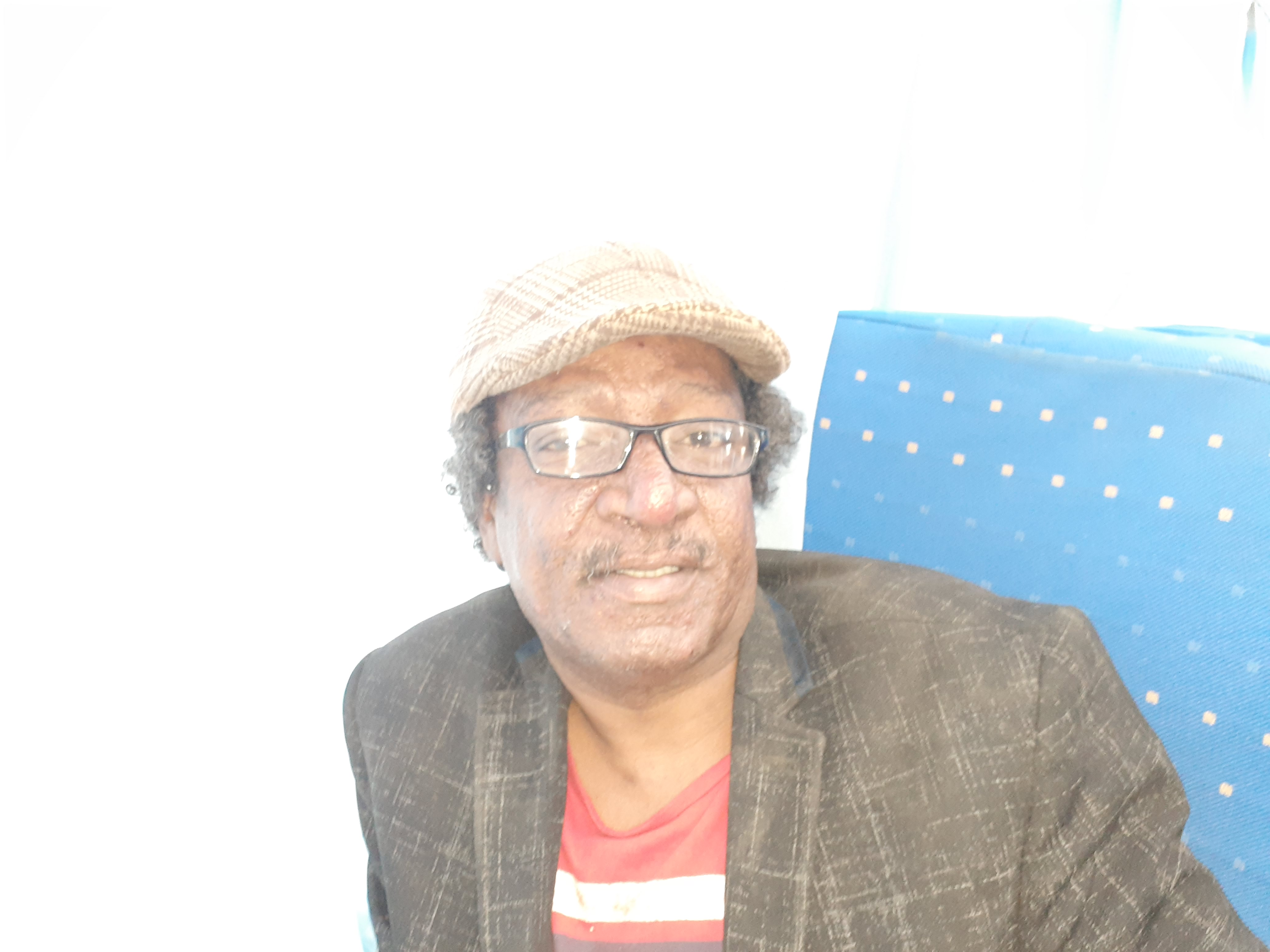 صورة للشاعر عثمان بشرى مأخوذة بكاميرا الهاتف